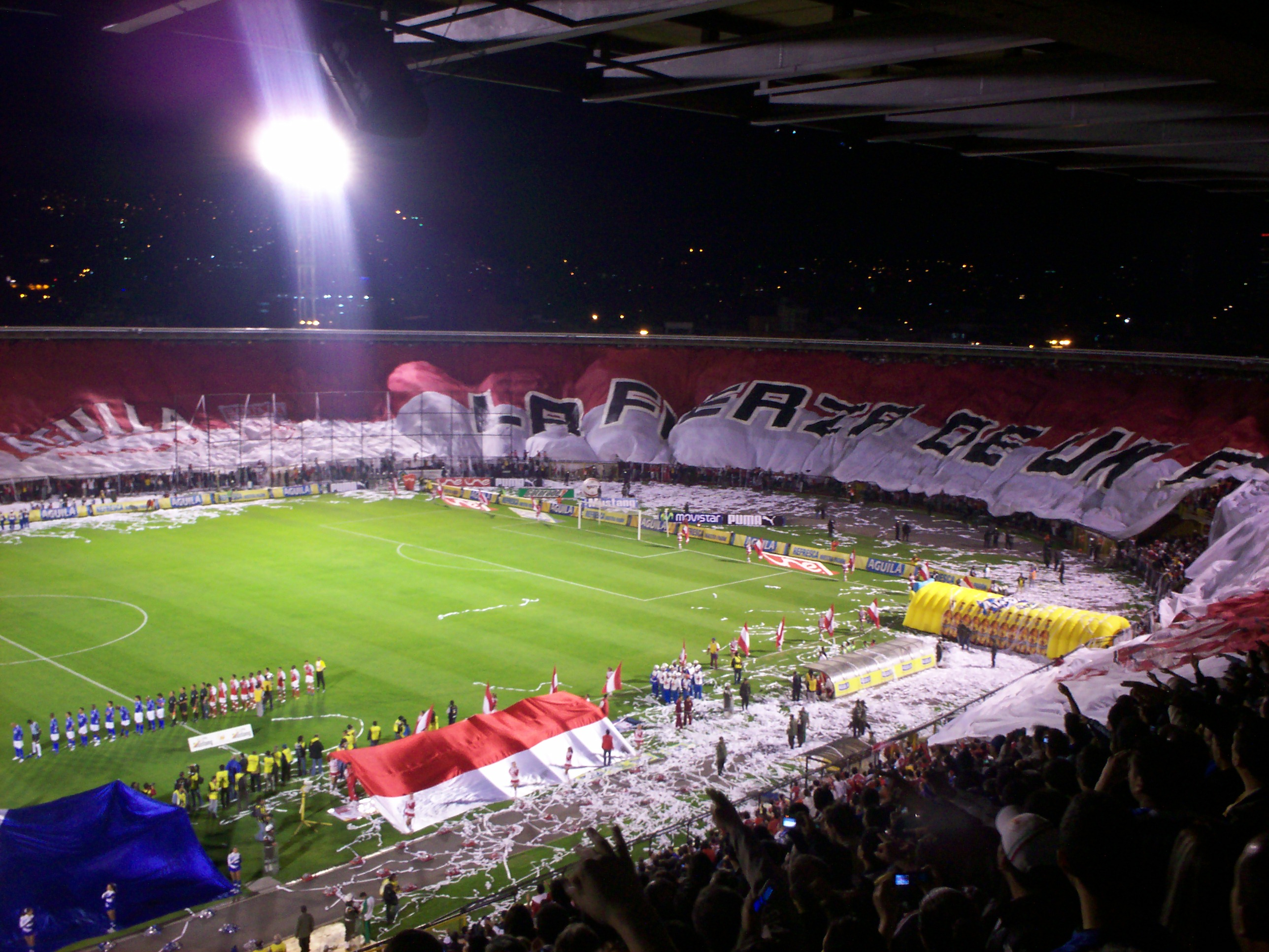 Clásico capitalino #250